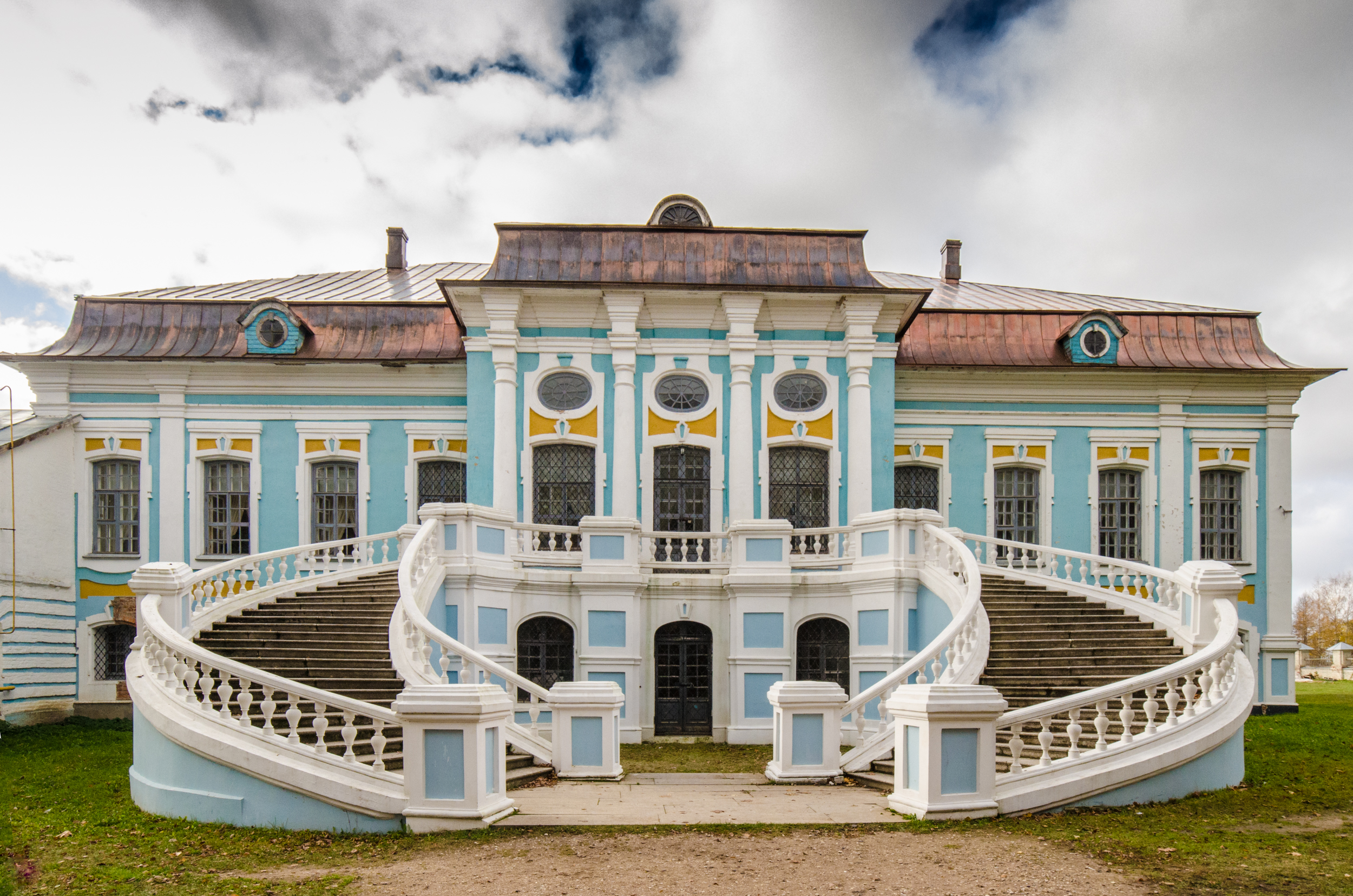 Главный дом: Хмелита, Вяземский район, Смоленская область